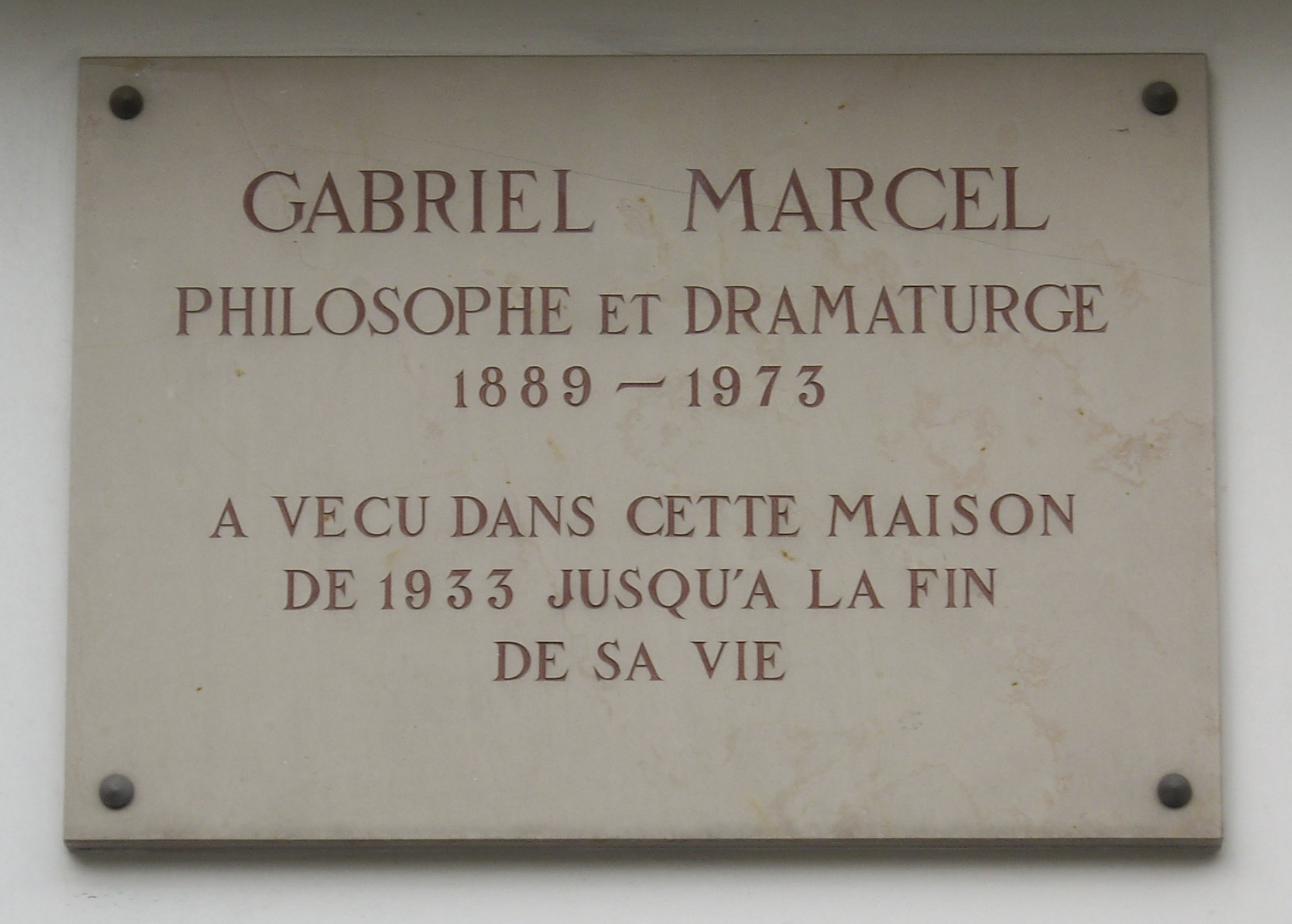 Plaque apposée au n° 21 de la rue de Tournon, Paris 6e, où vécut le philosophe et dramaturge Gabriel Marcel (1889-1973) de 1933 à sa mort en 1973.